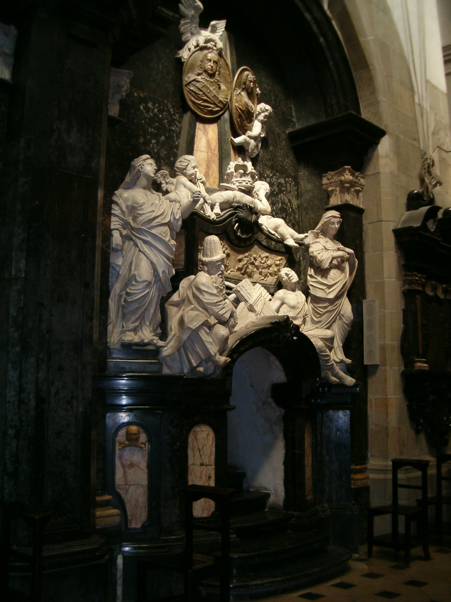 Nagrobek Michała Korybuta Wiśniowieckiego i Marii Eleonory Wiśniowieckiej w Królewskiej Katedrze na Wawelu